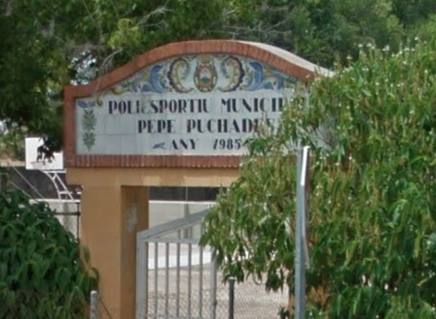 Poliesportiu municipal d'Albalat de la Ribera